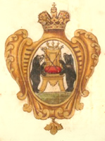 Новгород, герб (1730)